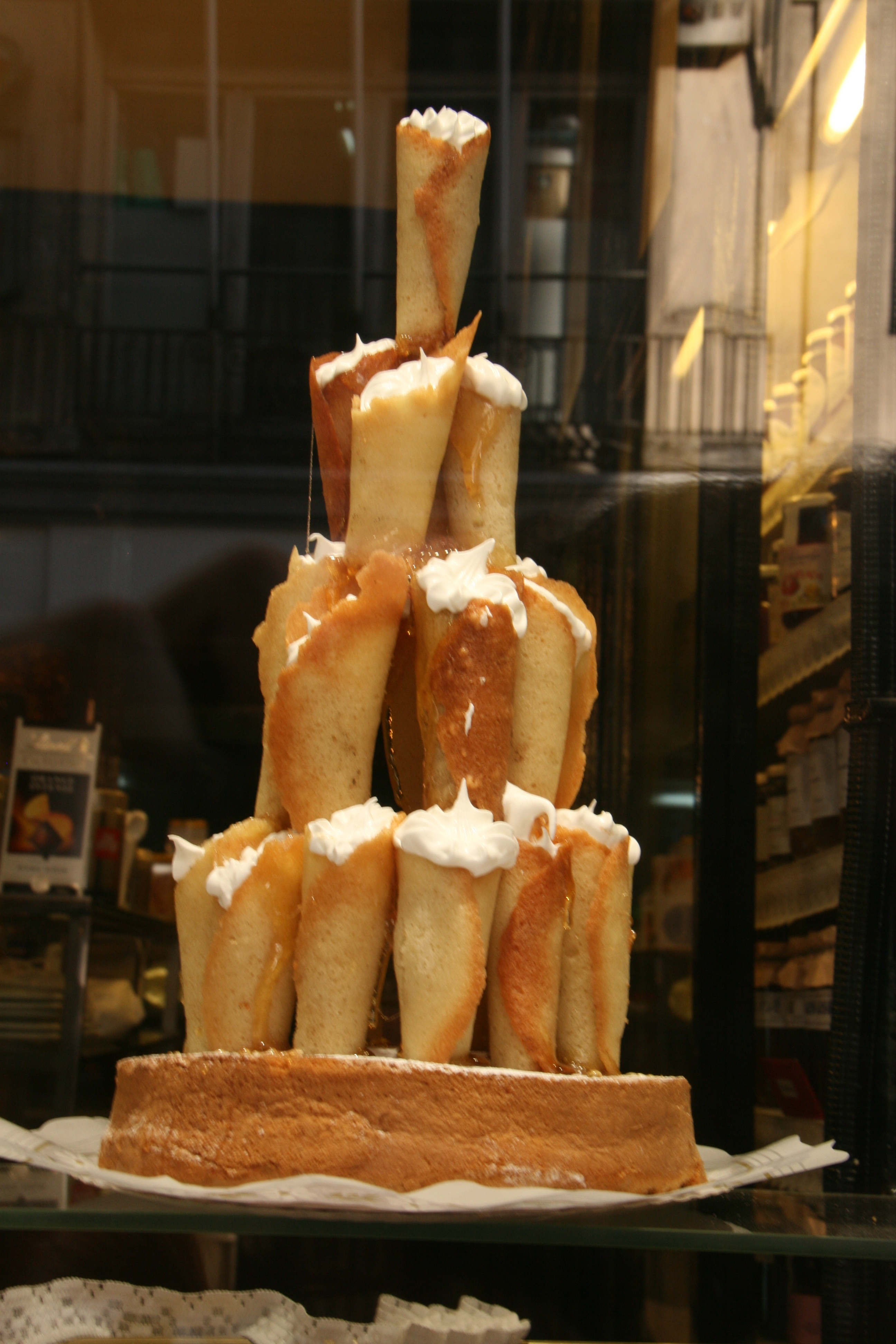 Torre de cucuruchos (Lhardy)